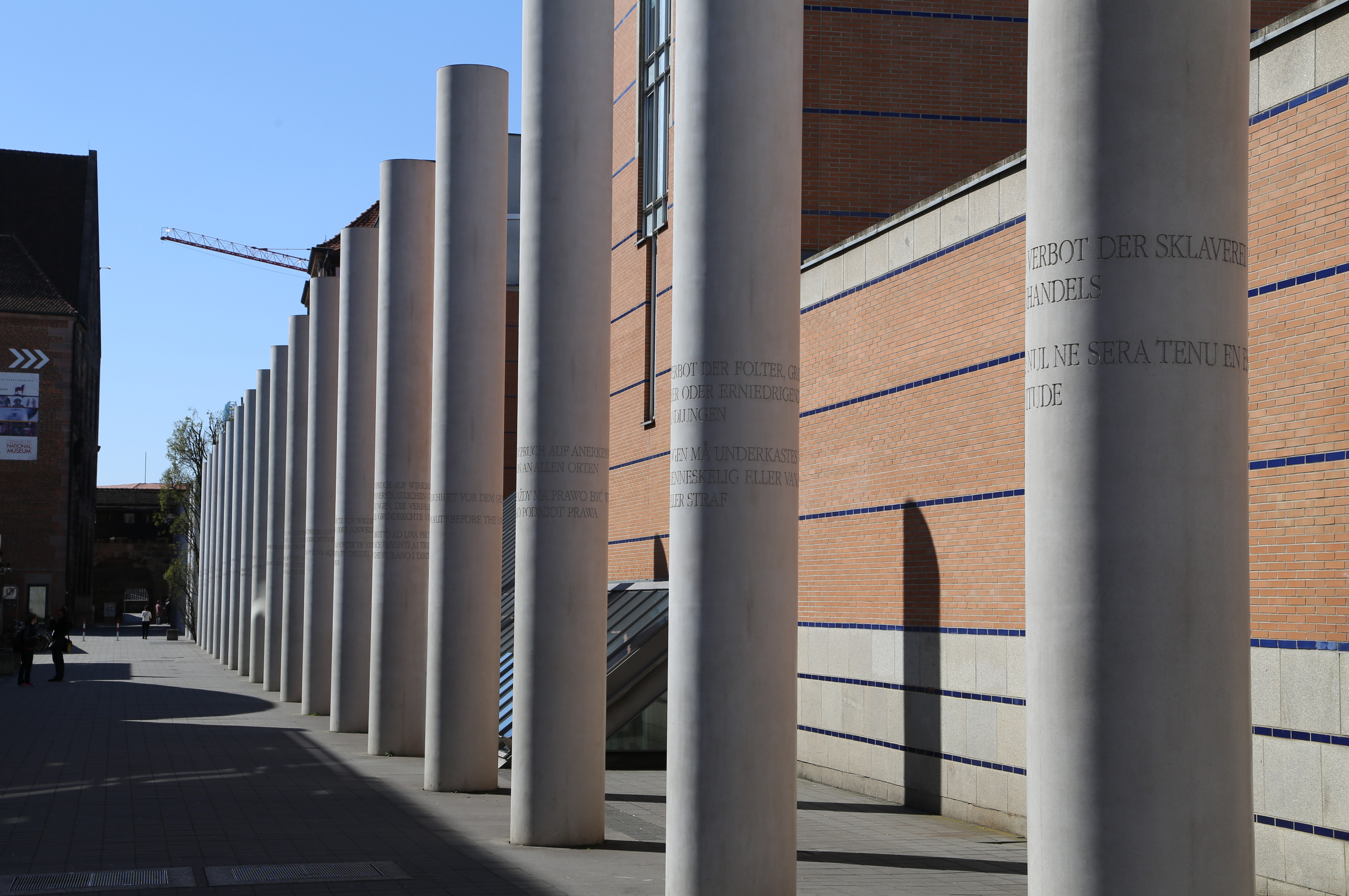 Straße der Menschenrechte, Germanisches Nationalmuseum, Nürnberg